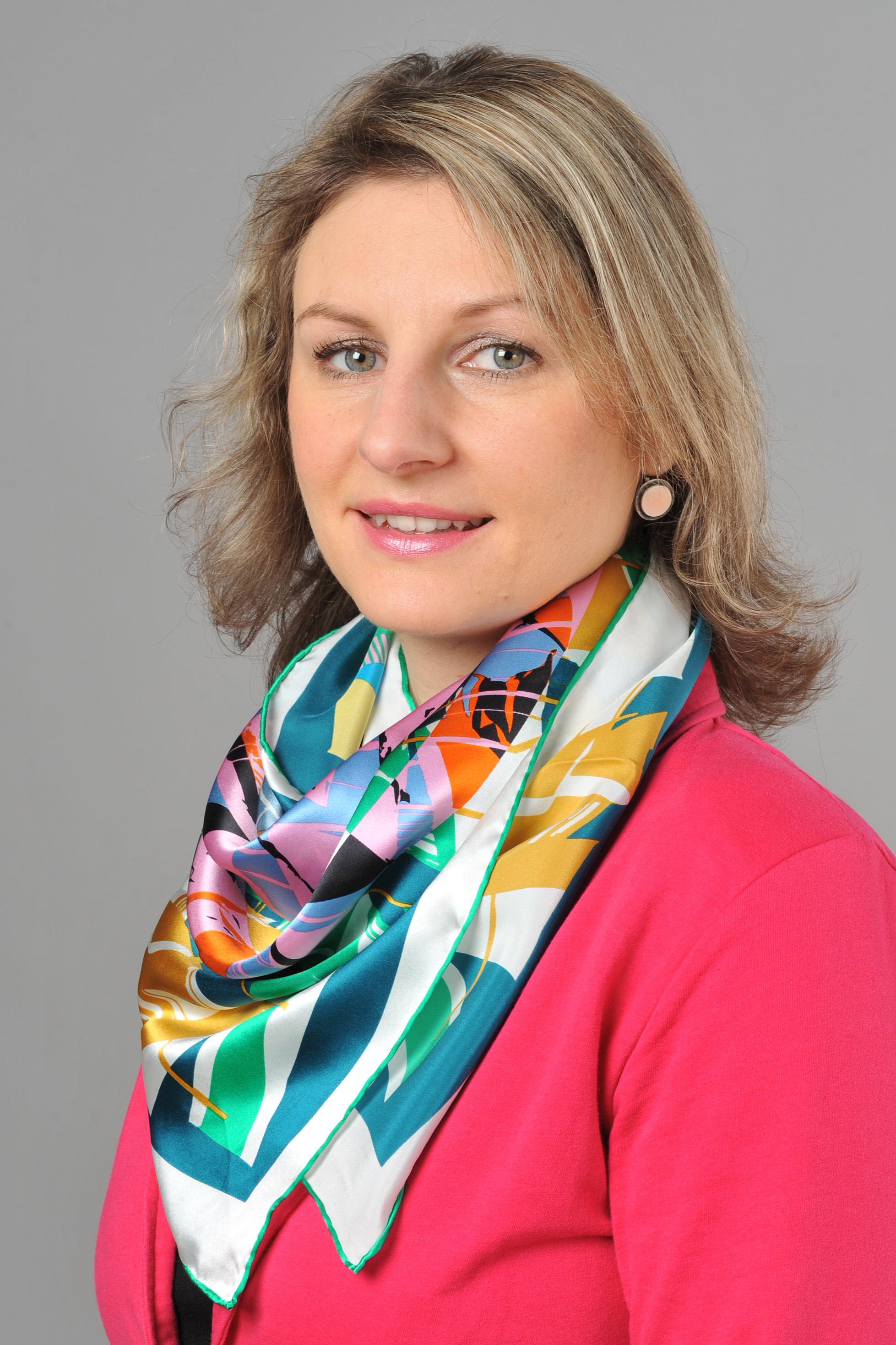 Landtagsprojekt Nordrhein-Westfalen 27. - 29. November 2013 Daniela Jansen